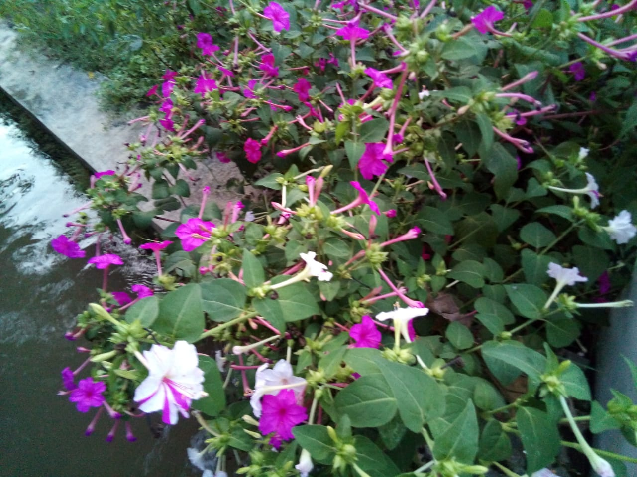 Basa Jawa: kembang gégér sore yaiku kembang sing mekar nalika ing wanci sore nganti esuk. menawa wayah esuk nganti awan, kembang iki mingkup. kembang iki duweni isi warna ireng. kembang iki warna wungu lan putih.